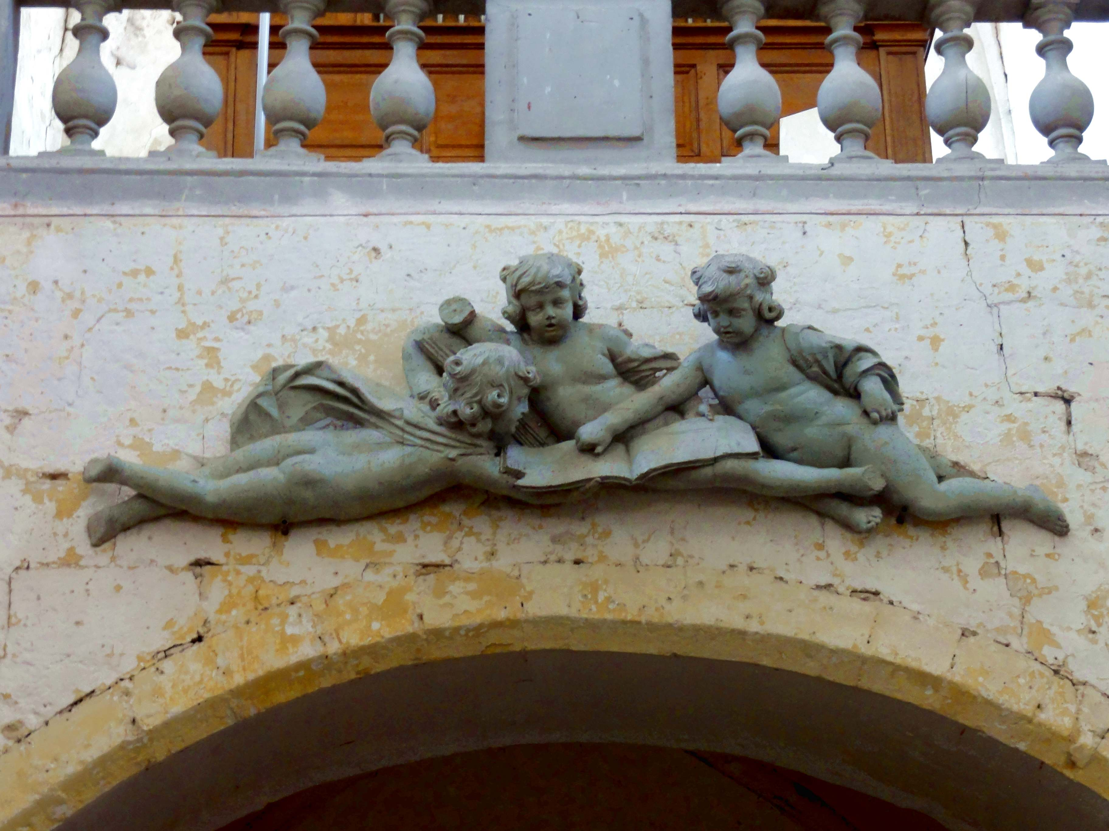 Haut-relief - enfants lisant, milieu XVIIe siècle.